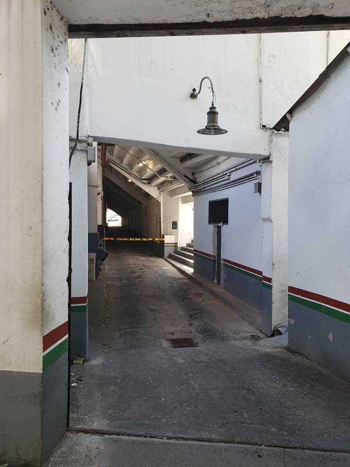 Entrada das arquibancadas do Estádio de Laranjeiras, estádio do Fluminense Footbal Club, em 30 de novembro de 2019.